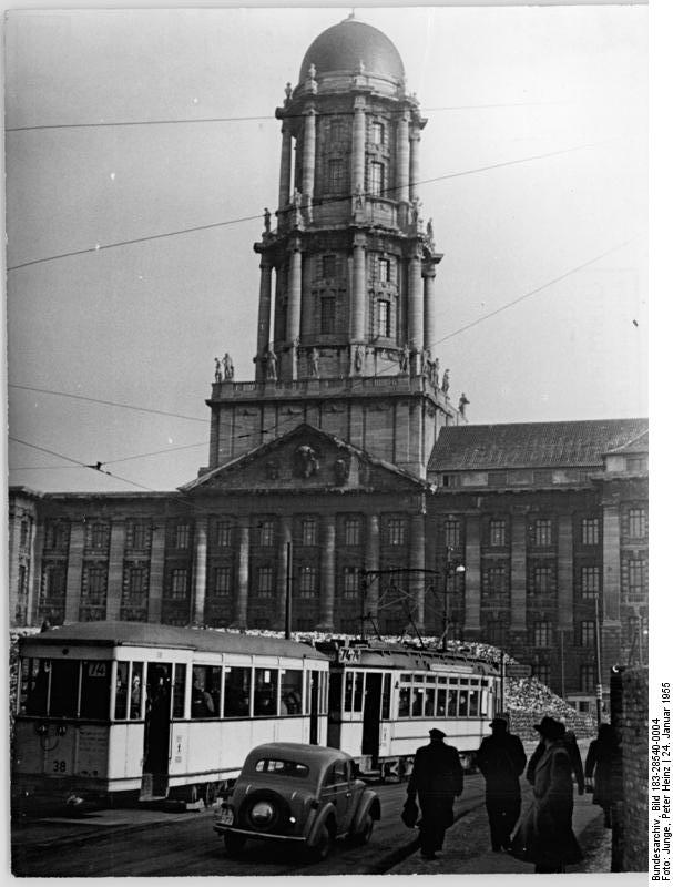 Berlin, Stadthaus, Straßenbahn Zentralbild Junge Wjtö-Ho. 6 Motive 24.1.1955 Berlin Altes Stadthausv vom Molenmarkt aus gesehen Aufmahme Januar 1955